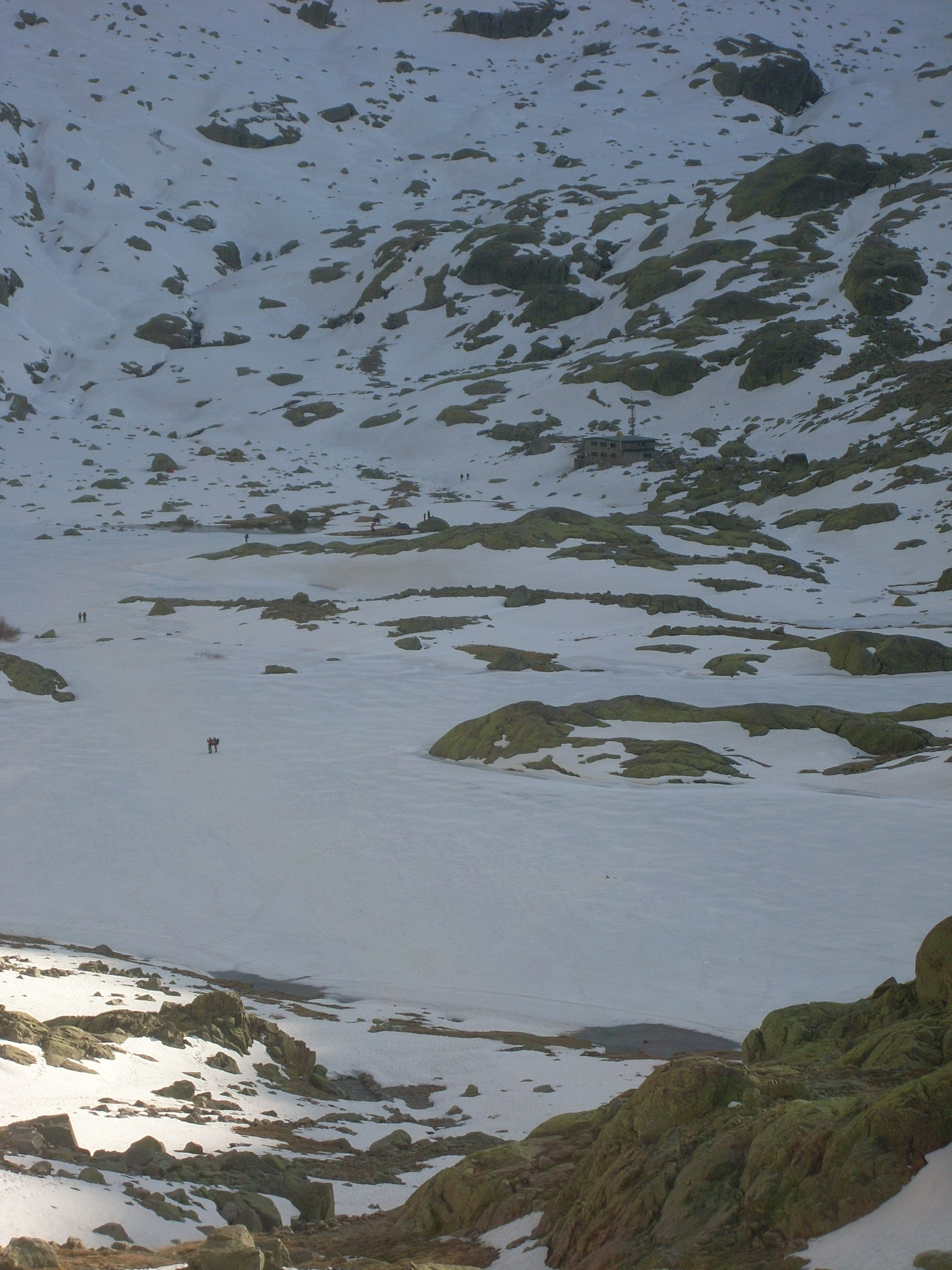 Laguna Grande de Gredos, (Avila), España